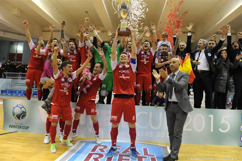 I giocatori del Real Rieti festeggiano la vittoria dell'edizione 2015